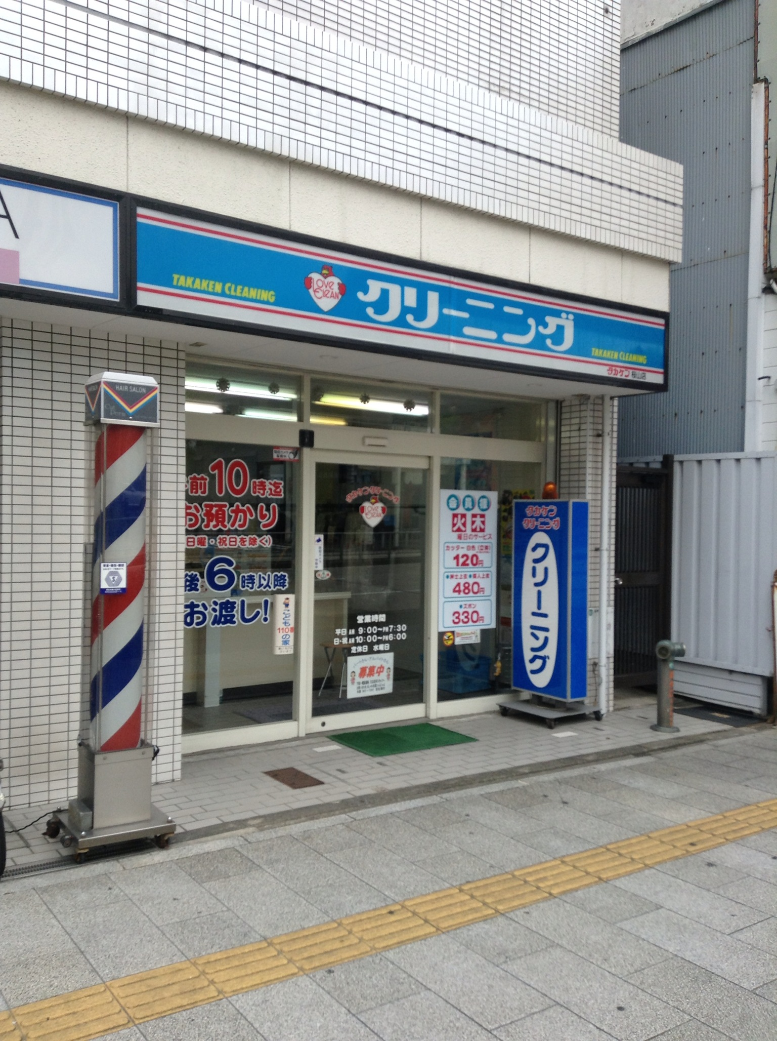 名古屋市瑞穂区桜山にあるタカケン桜山店